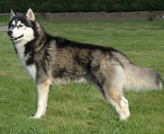 Black Magic Big Boy